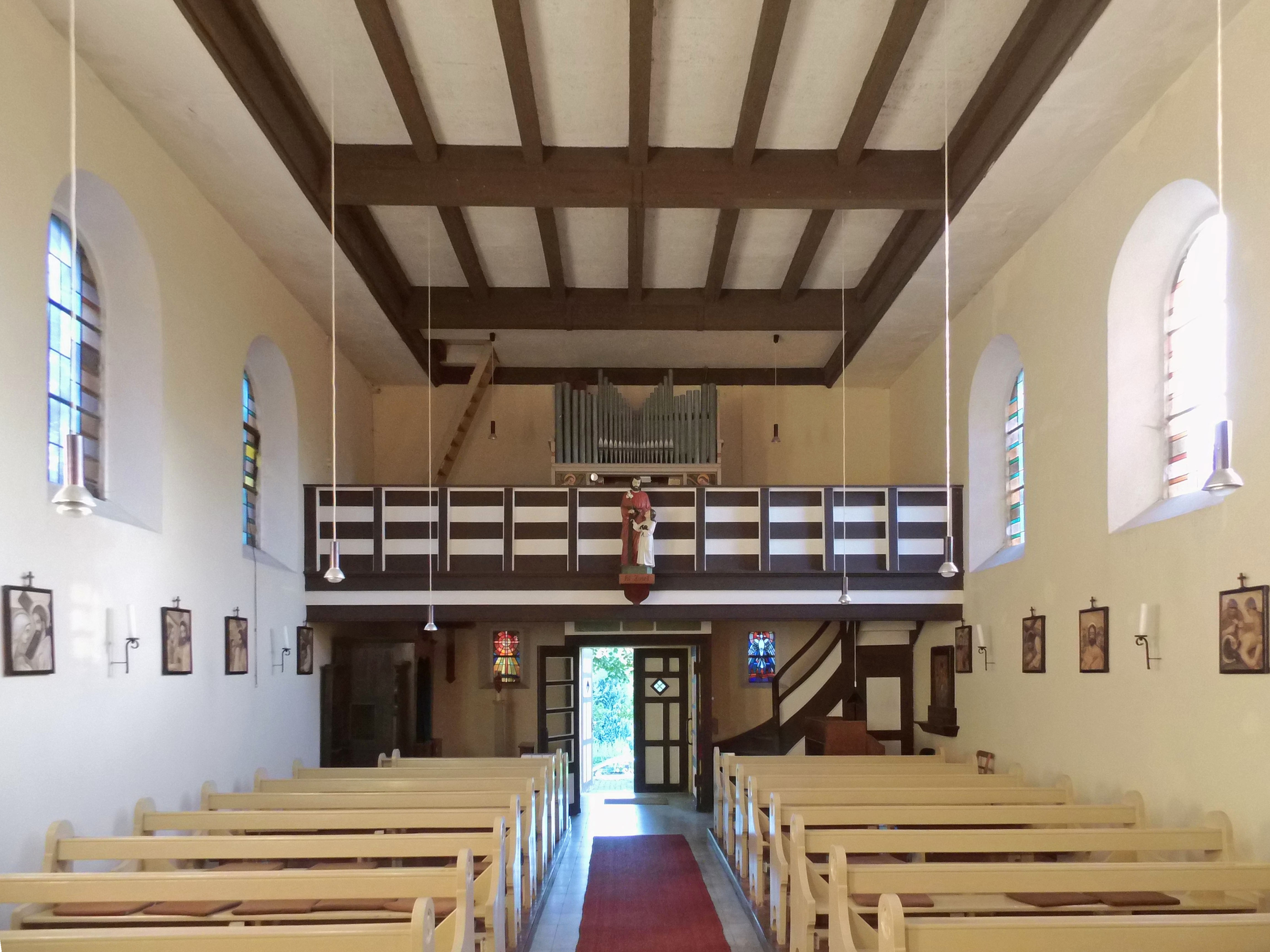 Katholische St.-Bernward-Kirche in Sommerschenburg, Bloick zur Orgelempore.